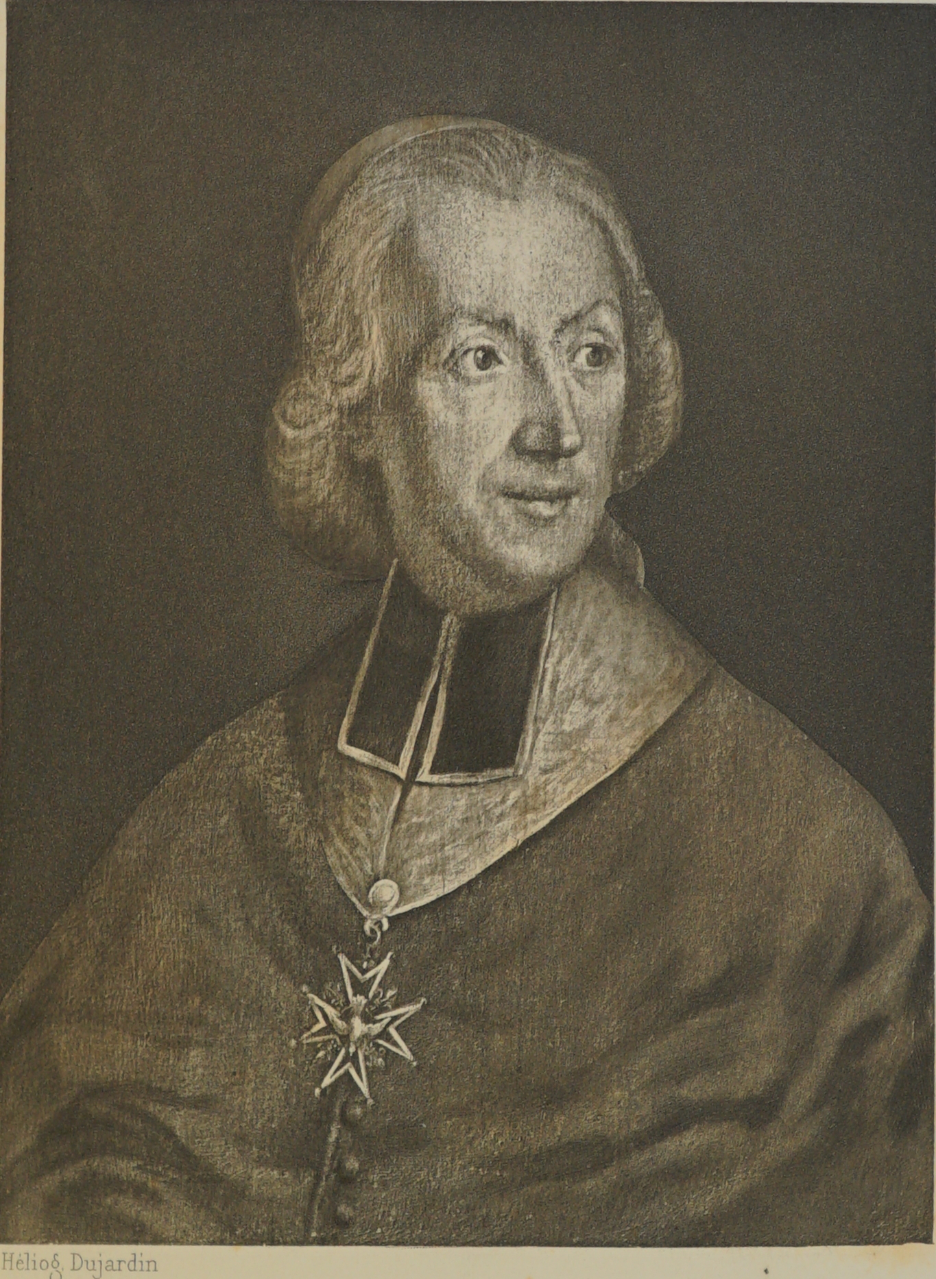 Cardinal Loménie de Brienne par Joseph Perrin.